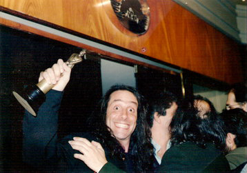 Manuel Wirzt, recibiendo el premio Martín Fierro